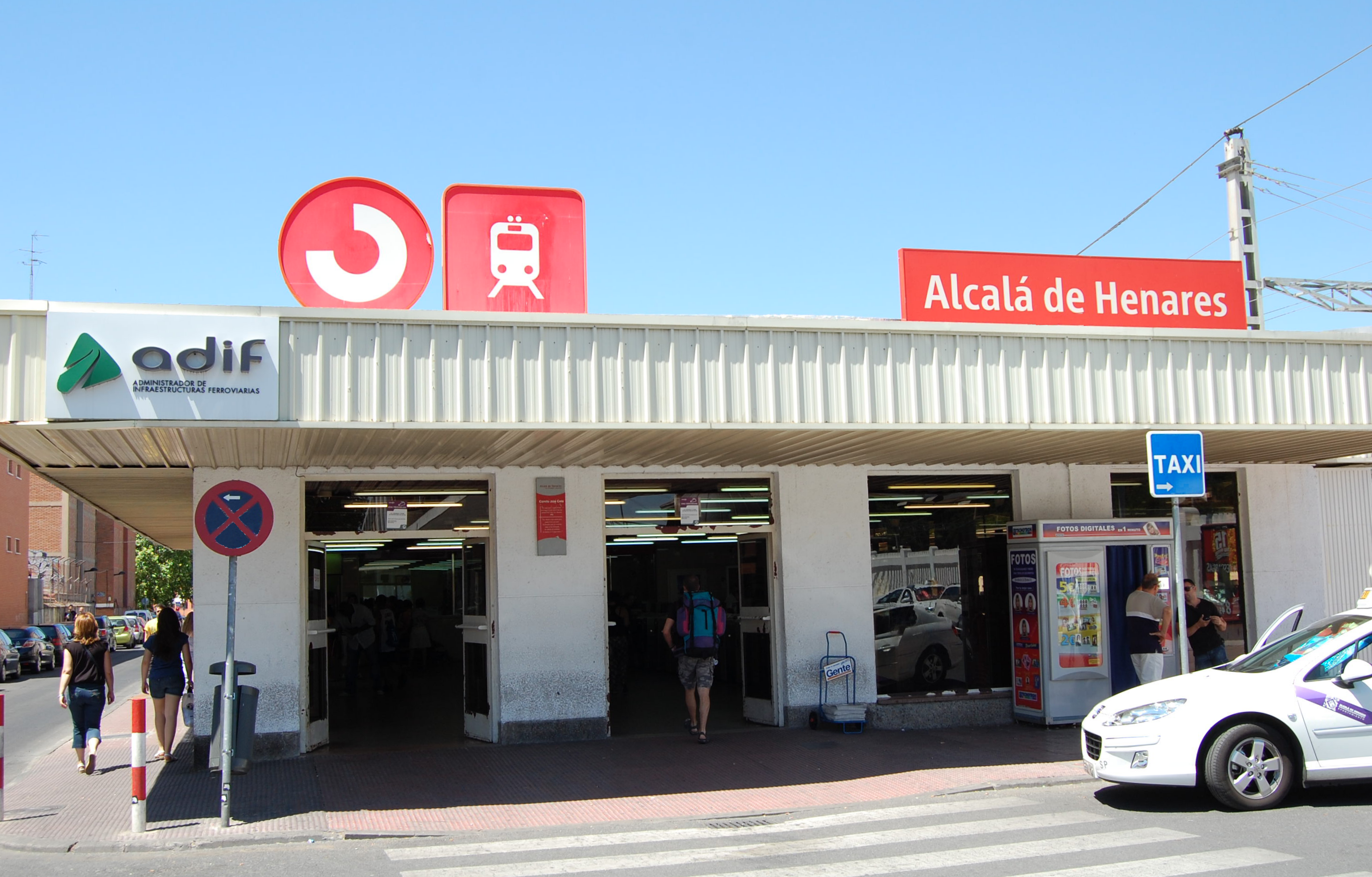 Entrada a la Estación principal de trenes de Alcalá de Henares, en Alcalá de Henares (Comunidad de Madrid - España). Inaugurada el 3 de mayo de 1859, aunque el edificio actual se puso en funcionamiento el 9 de febrero de 1989.